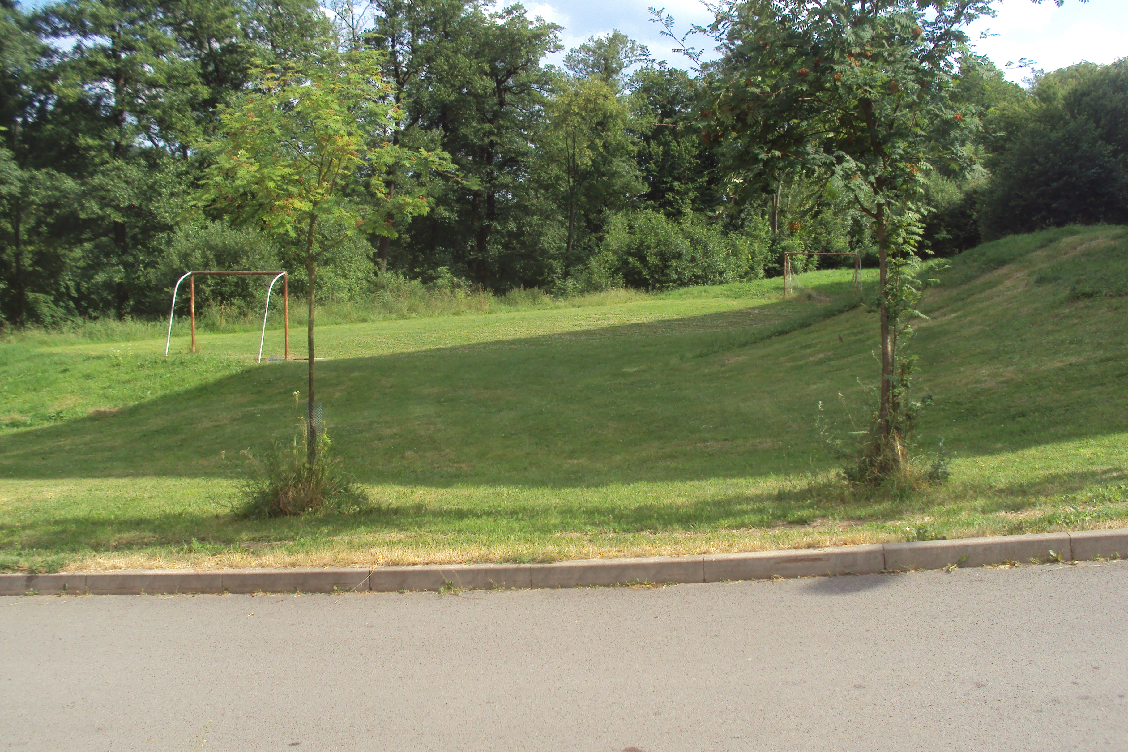 Horní malé hřiště v Nových Zákupech